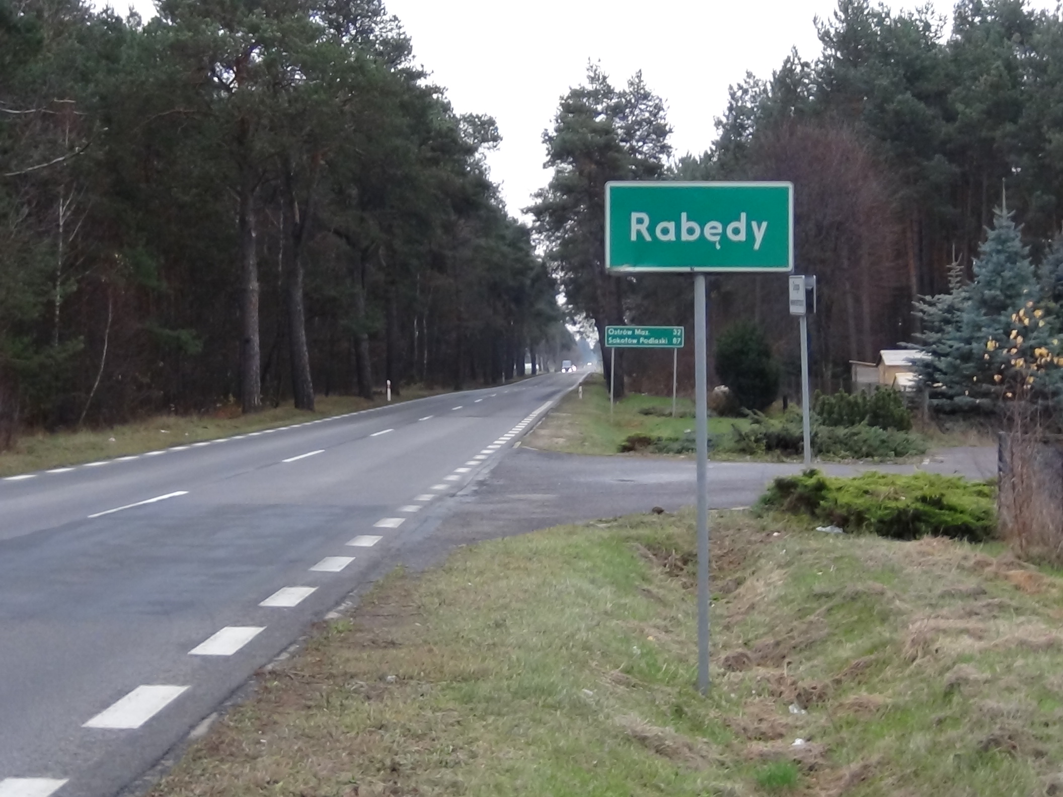 Widok od strony Zamościa